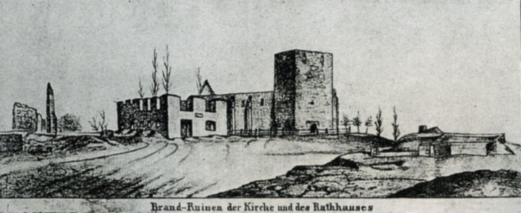 zerstörte Pfarrkirche von Medebach (Hochsauerlandkreis) nach dem Brand von 1844